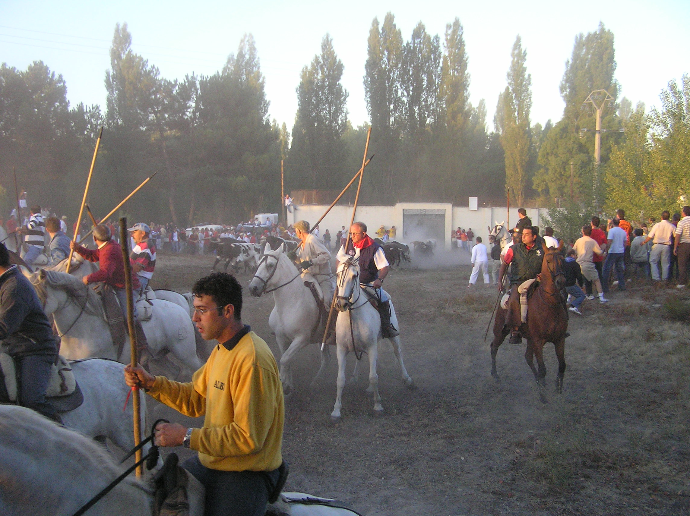 Suelta del ganado en el encierro de Cuéllar